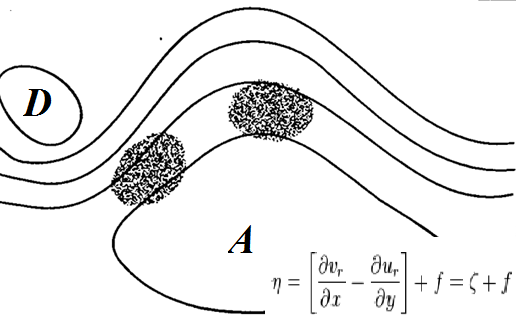 Zone où le tourbillon absolu dans l'atmosphère est près de zéro lors d'un déplacement d'un particule d'air venant d'une dépression. Dans ces zones, la stabilité inertielle est faible.